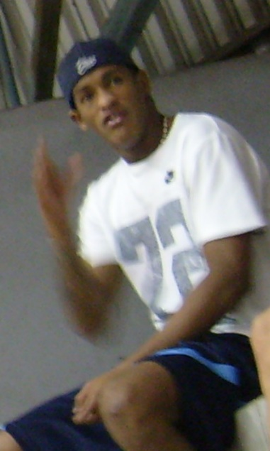 Alexandro da Silva Batista, futebolista do Botafogo de Futebol e Regatas que joga de atacante.